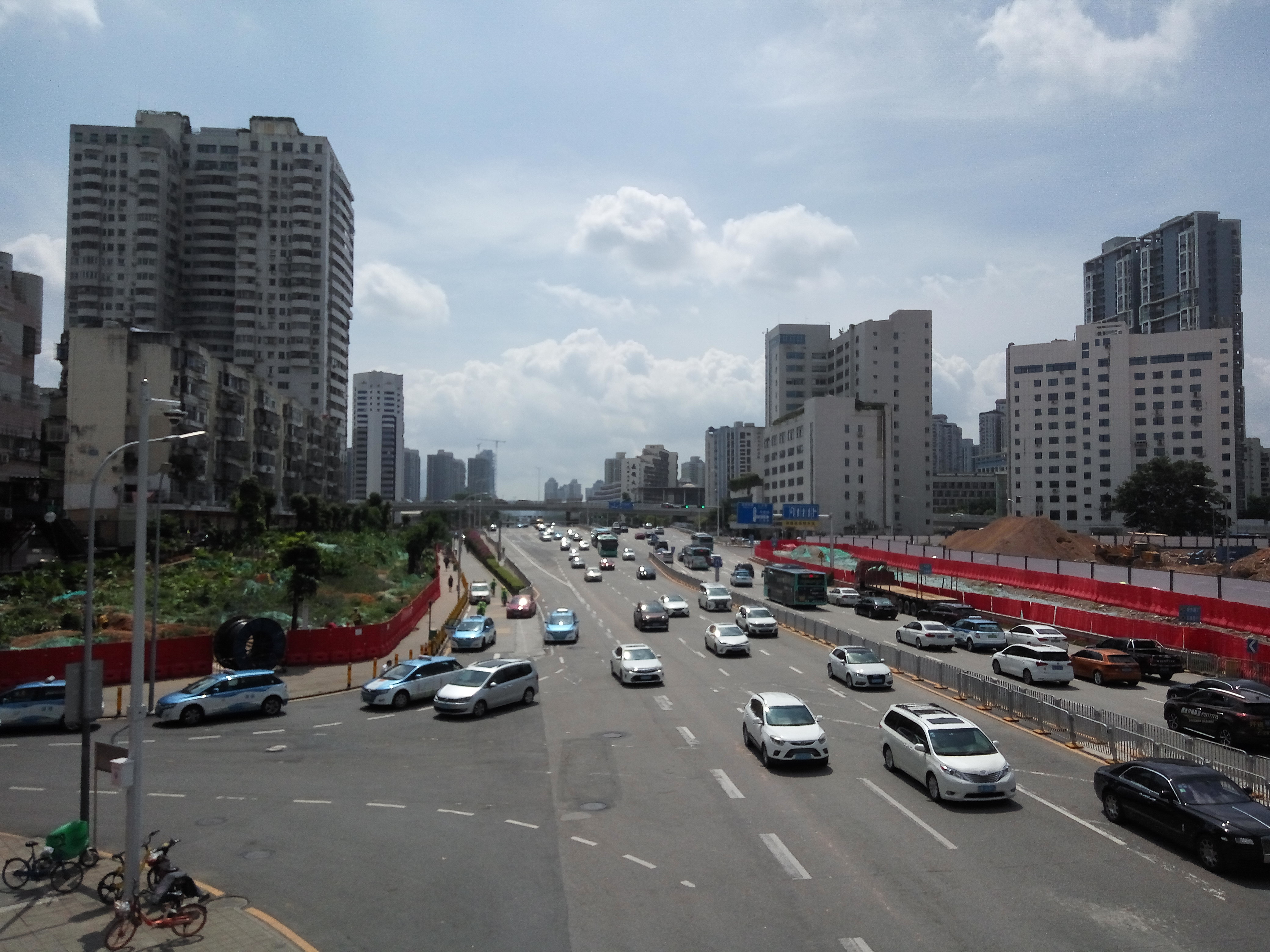 深圳市笋岗路（黄木岗段，近深圳市二医院）